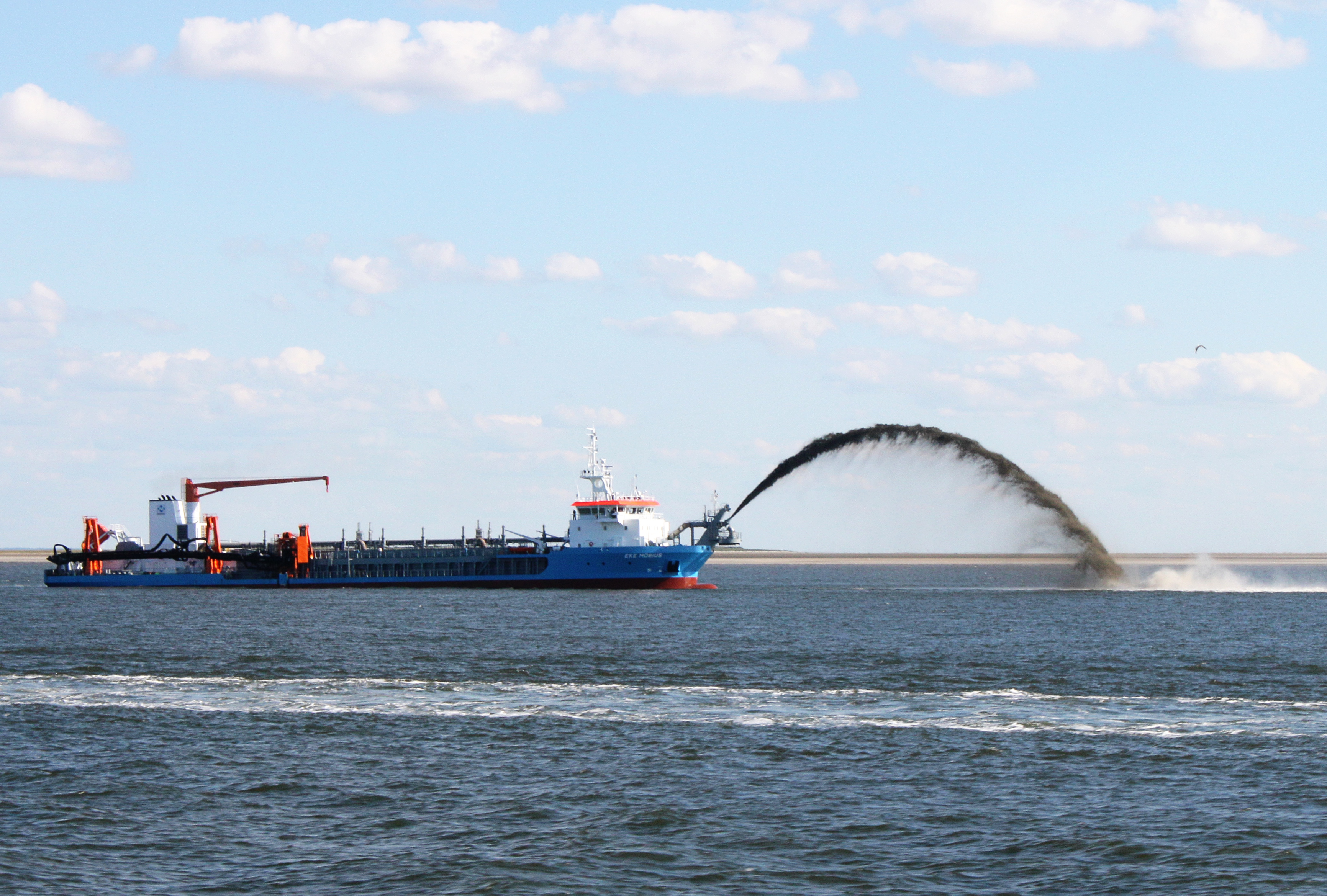 Eke Möbius; Hopperbagger; Position: (der Fotograf - mit de Katamaran) von Helgoland kommend - kurz vor der Einfahrt in Cuxhaven